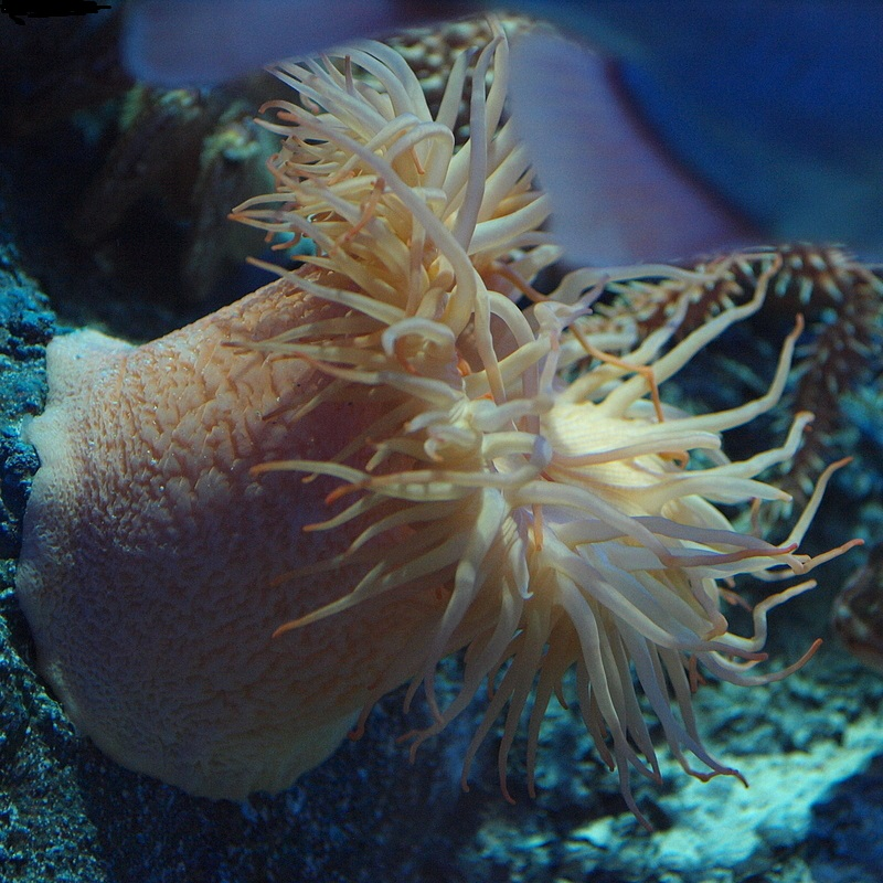 Actinostola callosa en acuario